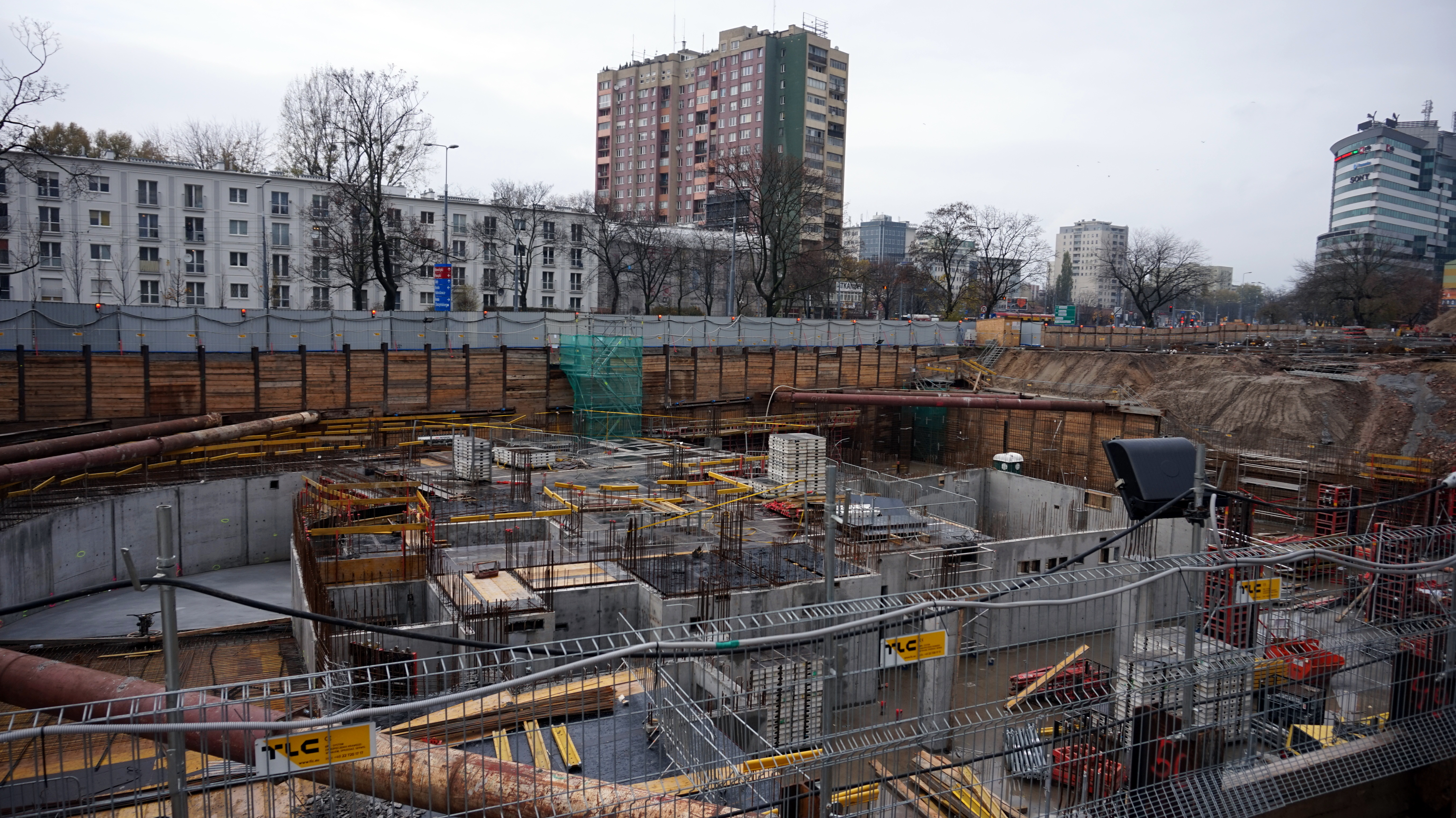 Budowa Spark 2016-11-06